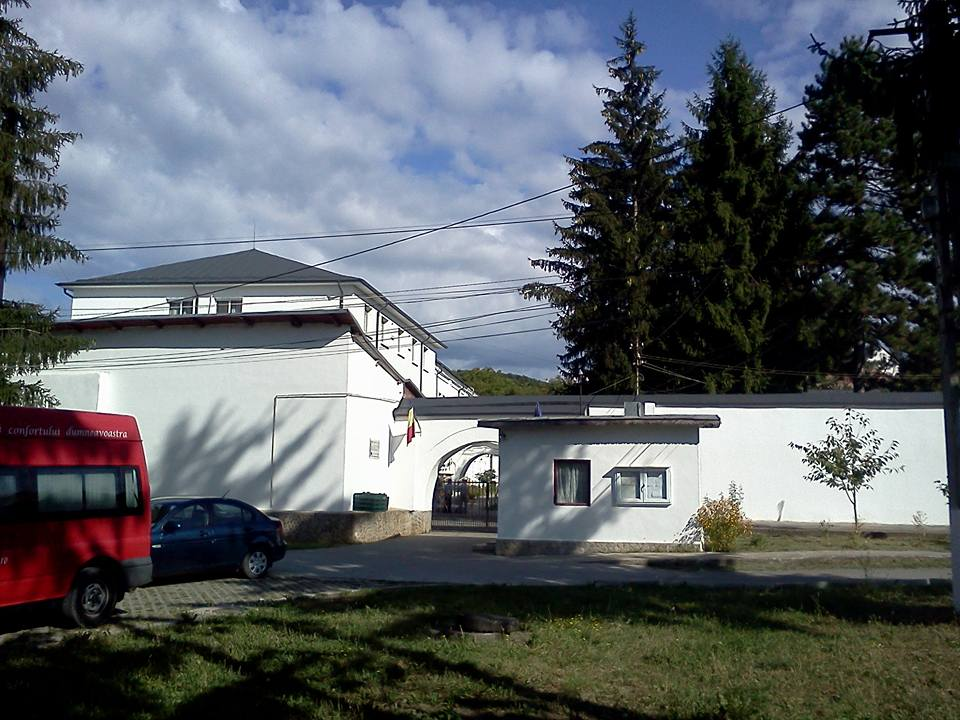 Fosta mănăstire Mislea